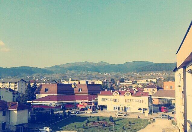 Српски (ћирилица): Поглед на Шипово с новоизграђене зграде општине.